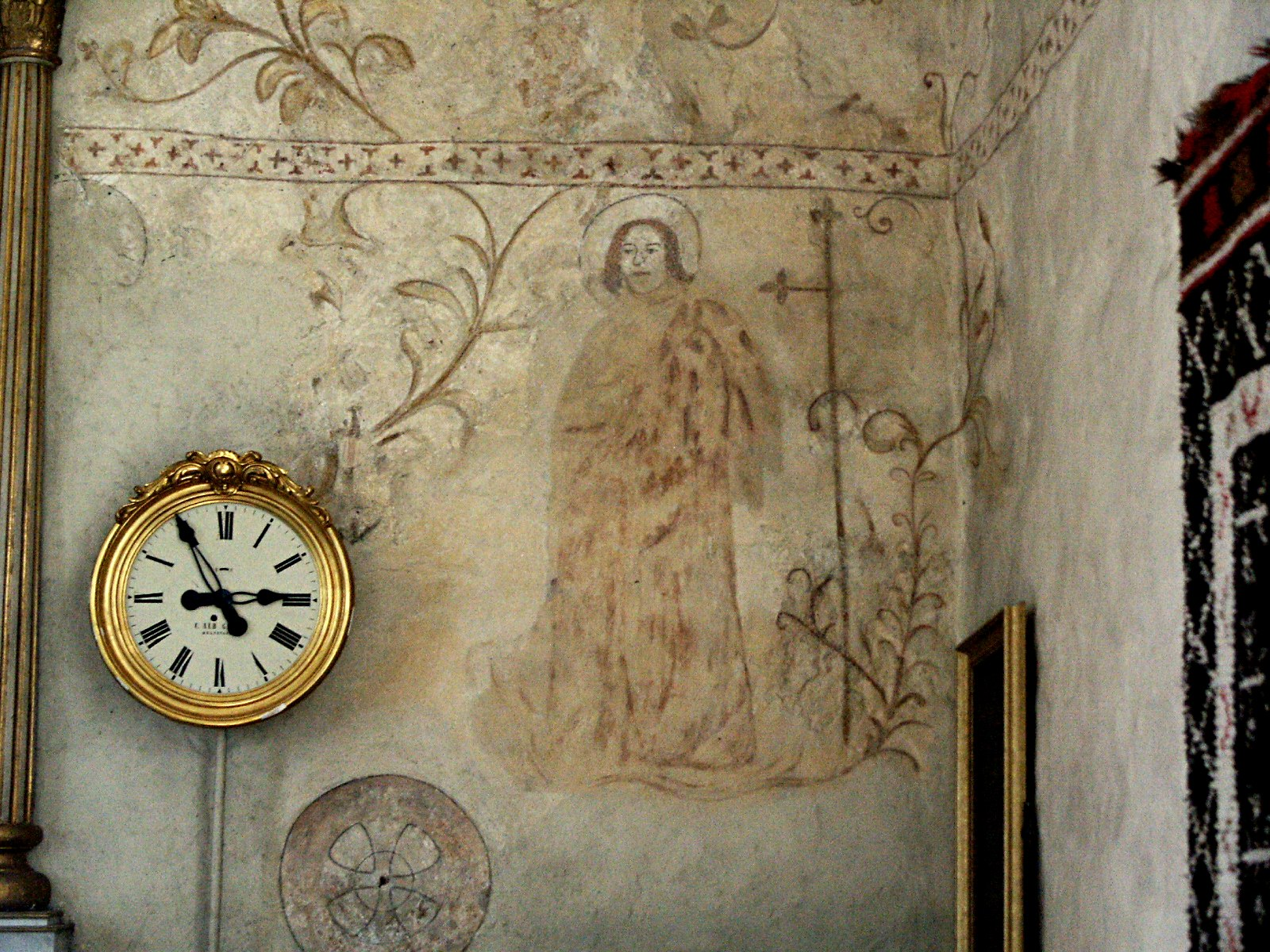 Eckerön kirkko sisältä, Ahvenanmaa. Kirkon seinämaalauksia